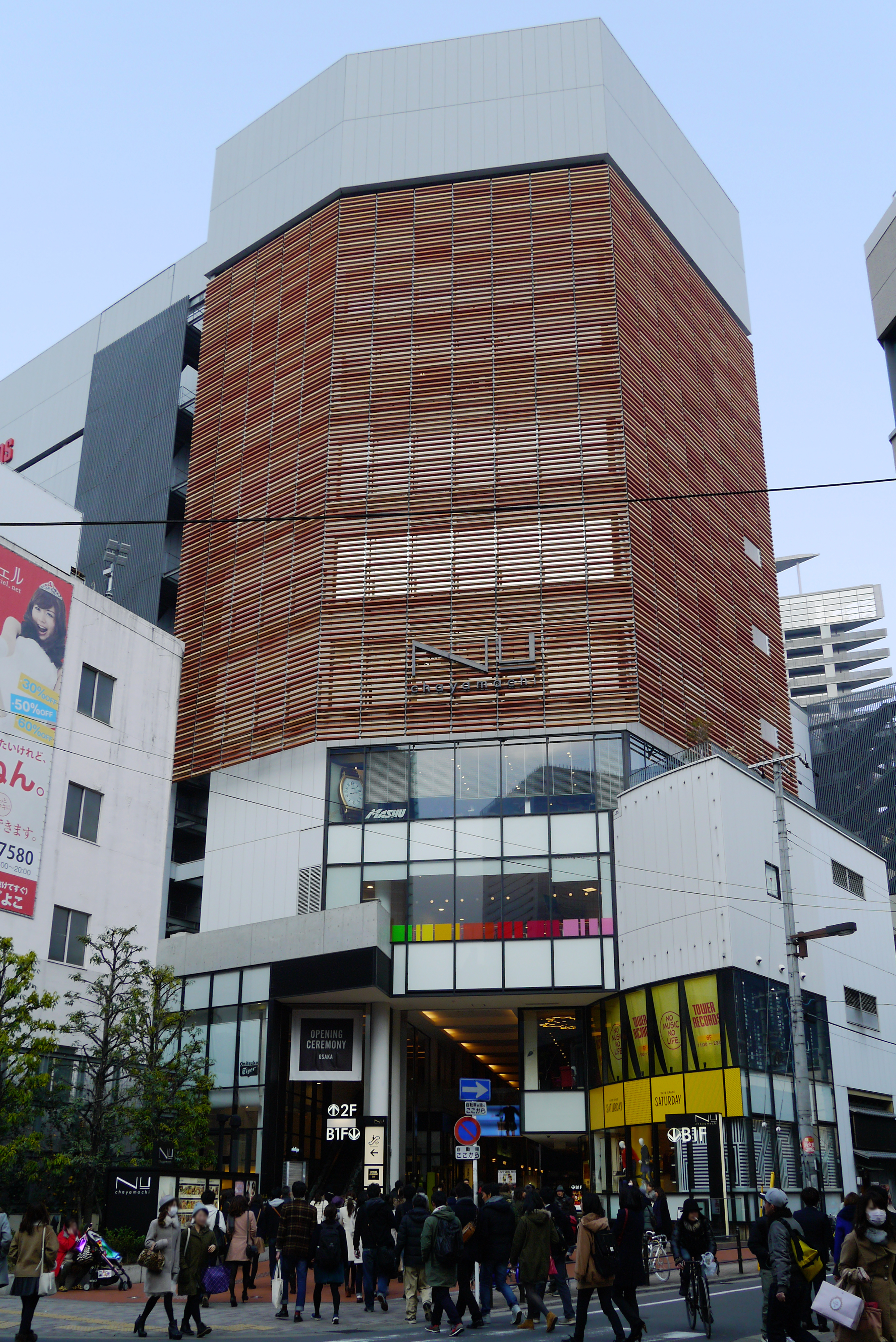 NU-Chayamachi (NU茶屋町), Osaka, Osaka prefecture, Japan